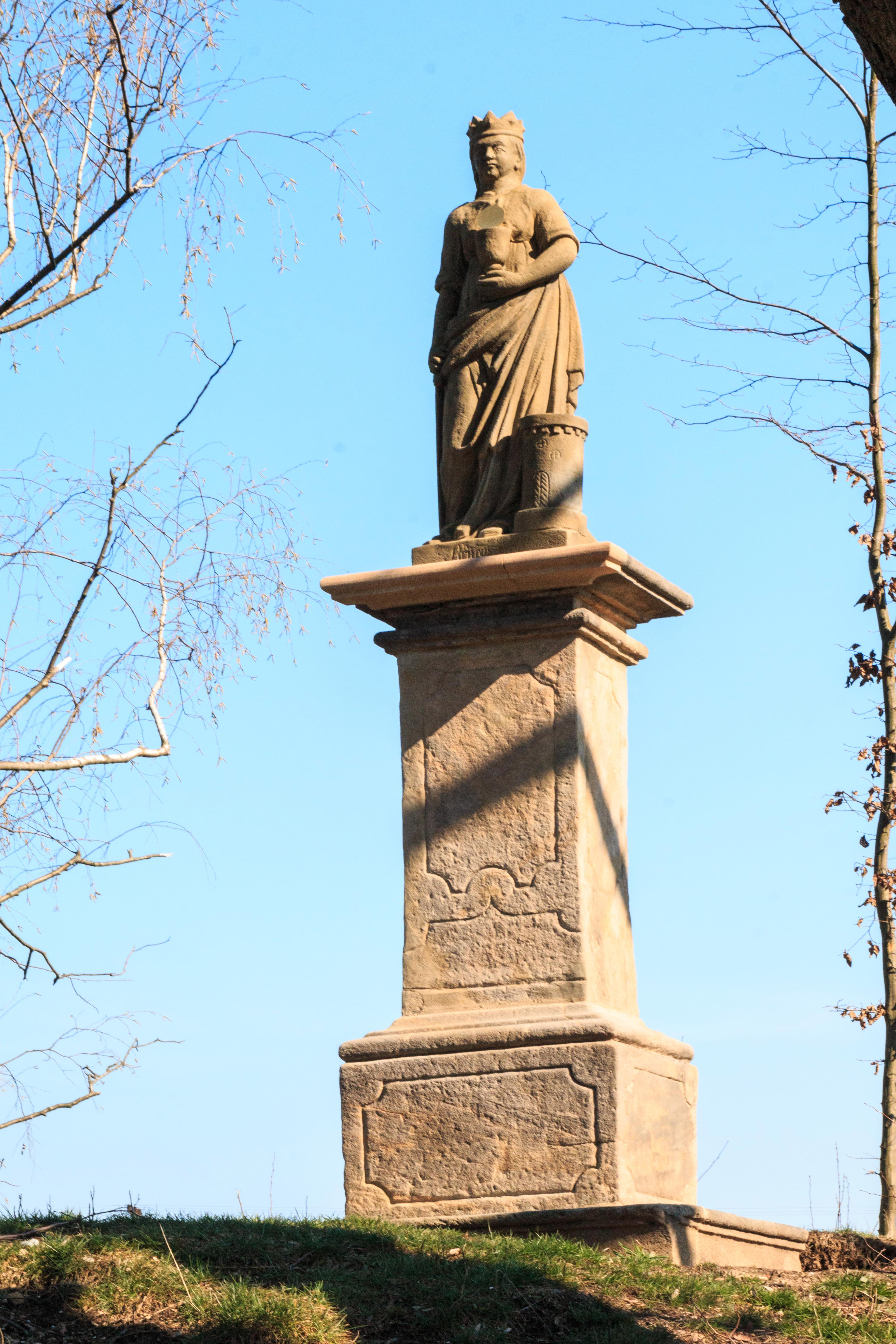 socha světice u Staňkovy Lhoty